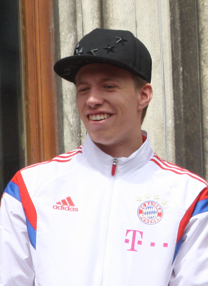 Der Fußballspieler Mitchell Weiser während der Double-Feier des FC Bayern auf dem Münchner Rathaus-Balkon.